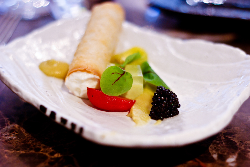 Assiette présentant une cigarette russe fourée au fromage blanc, des touches de mûres, un morceau de pomme, ainsi qu'½ fraise.